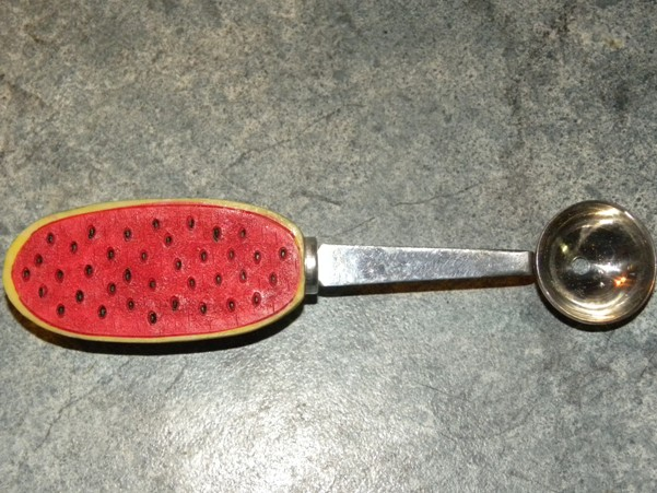 Watermelon Baller